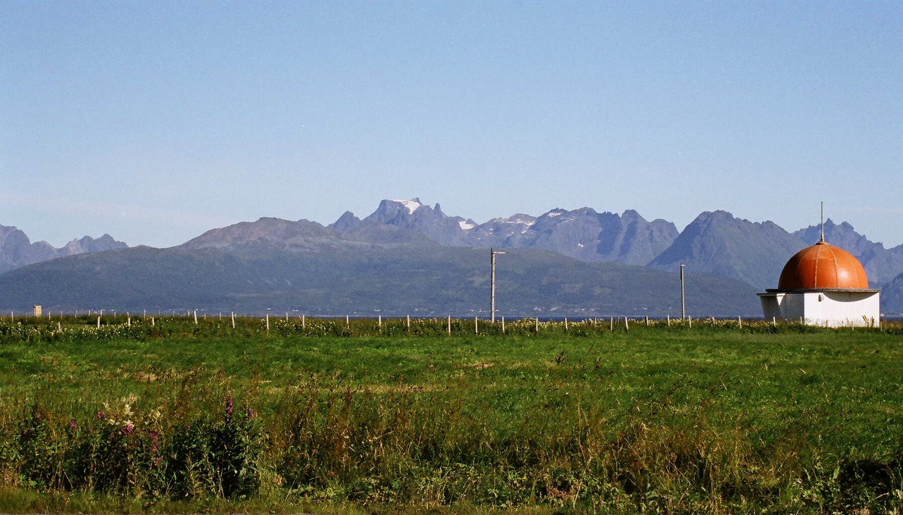 Møysalen på Hinnøy i Nordland sett fra Stokmarknes lufthavn